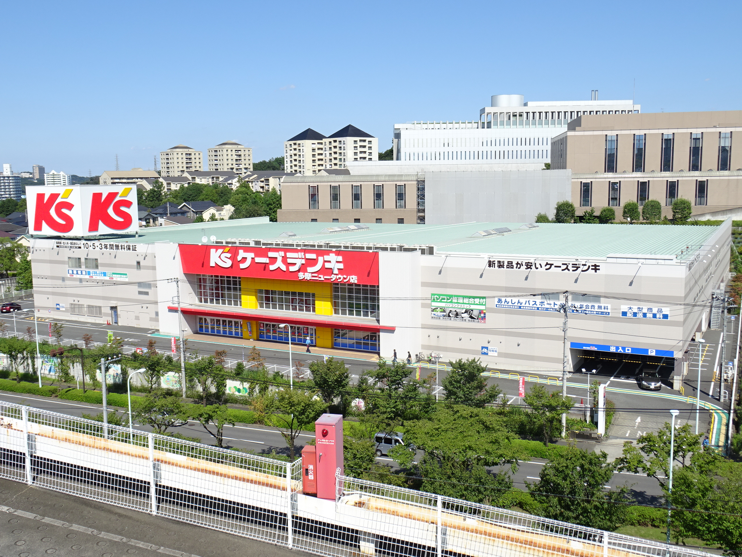 ケーズデンキ多摩ニュータウン店（2015/09/20撮影）